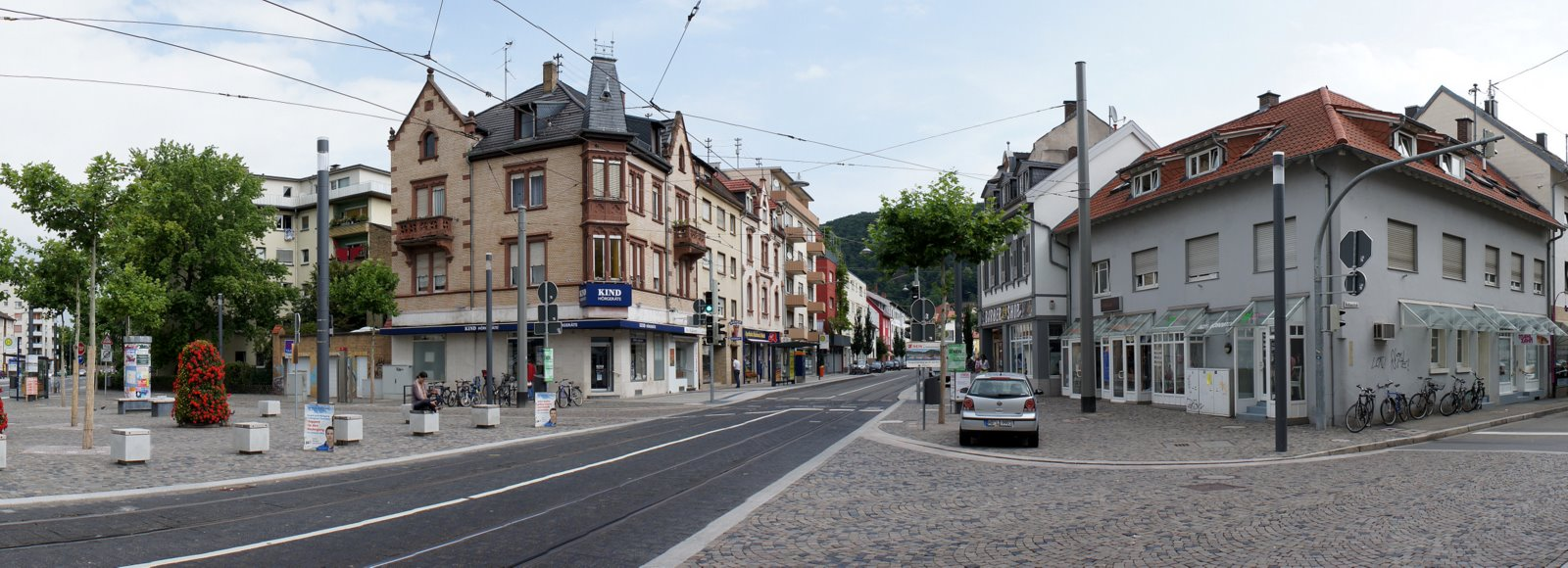 HD Rohrbach markt Panorama